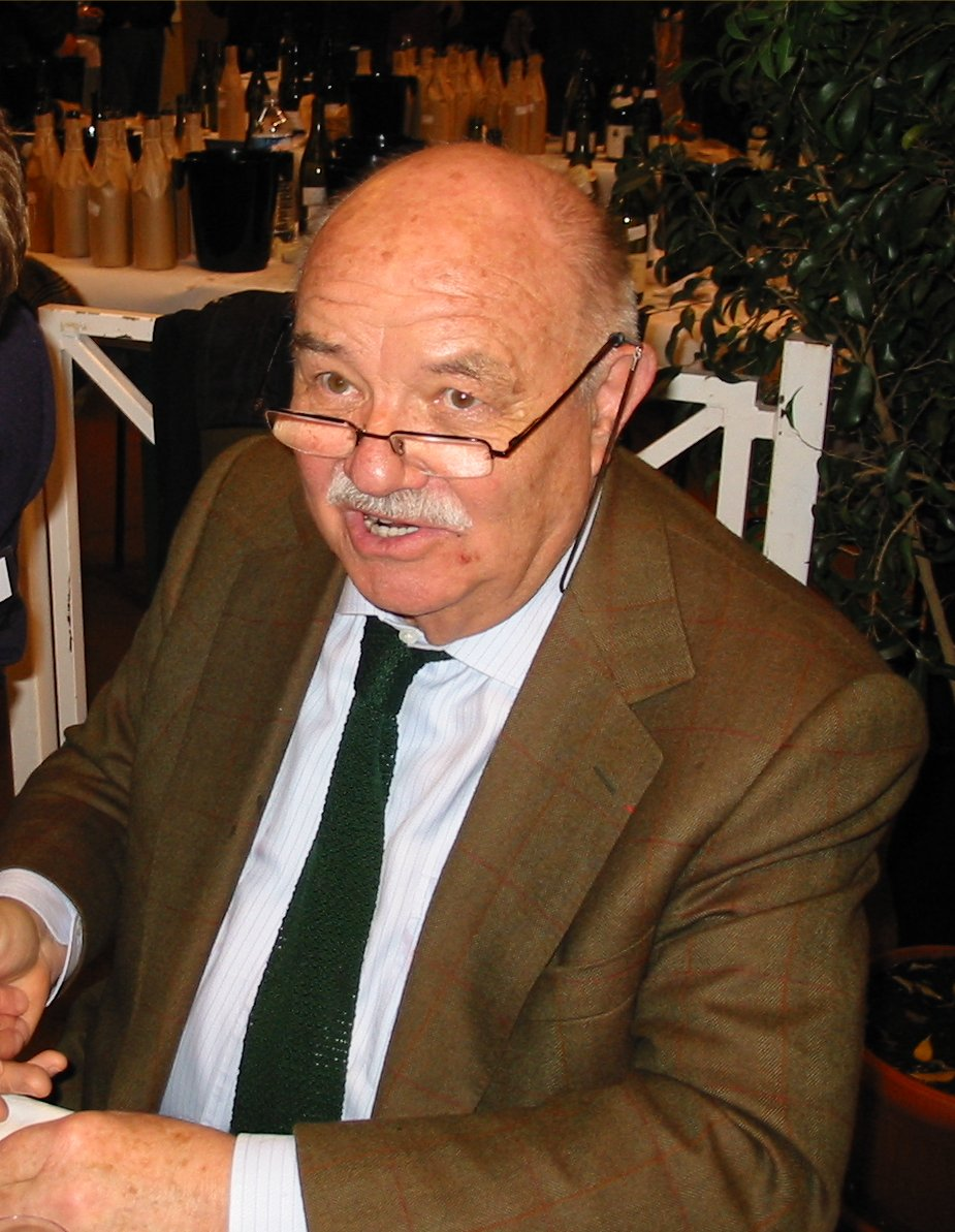 Pierre Troisgros, grand chef cuisinier au restaurant les frères Troigros de Roanne